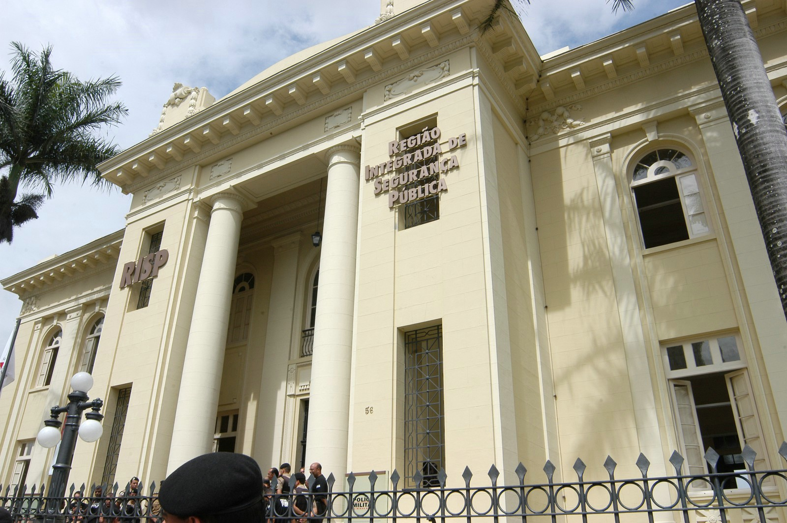 Risp, QG integrado a Polícia Militar e Civil de Minas Gerais